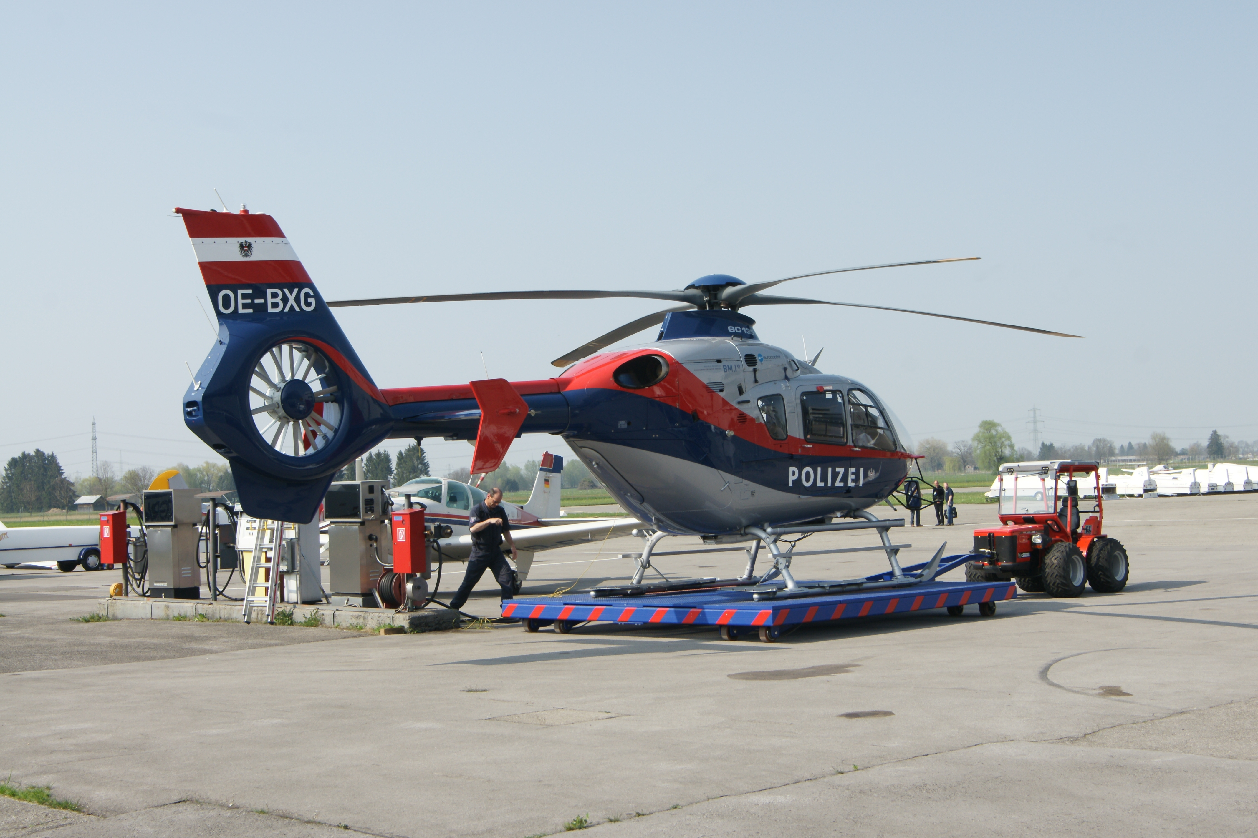 Eurocopter EC 135 Hubschrauber der Flugpolizei des Bundesministerium für Inneres der Republik Österreich stationiert am Hohenemser Flughafen.